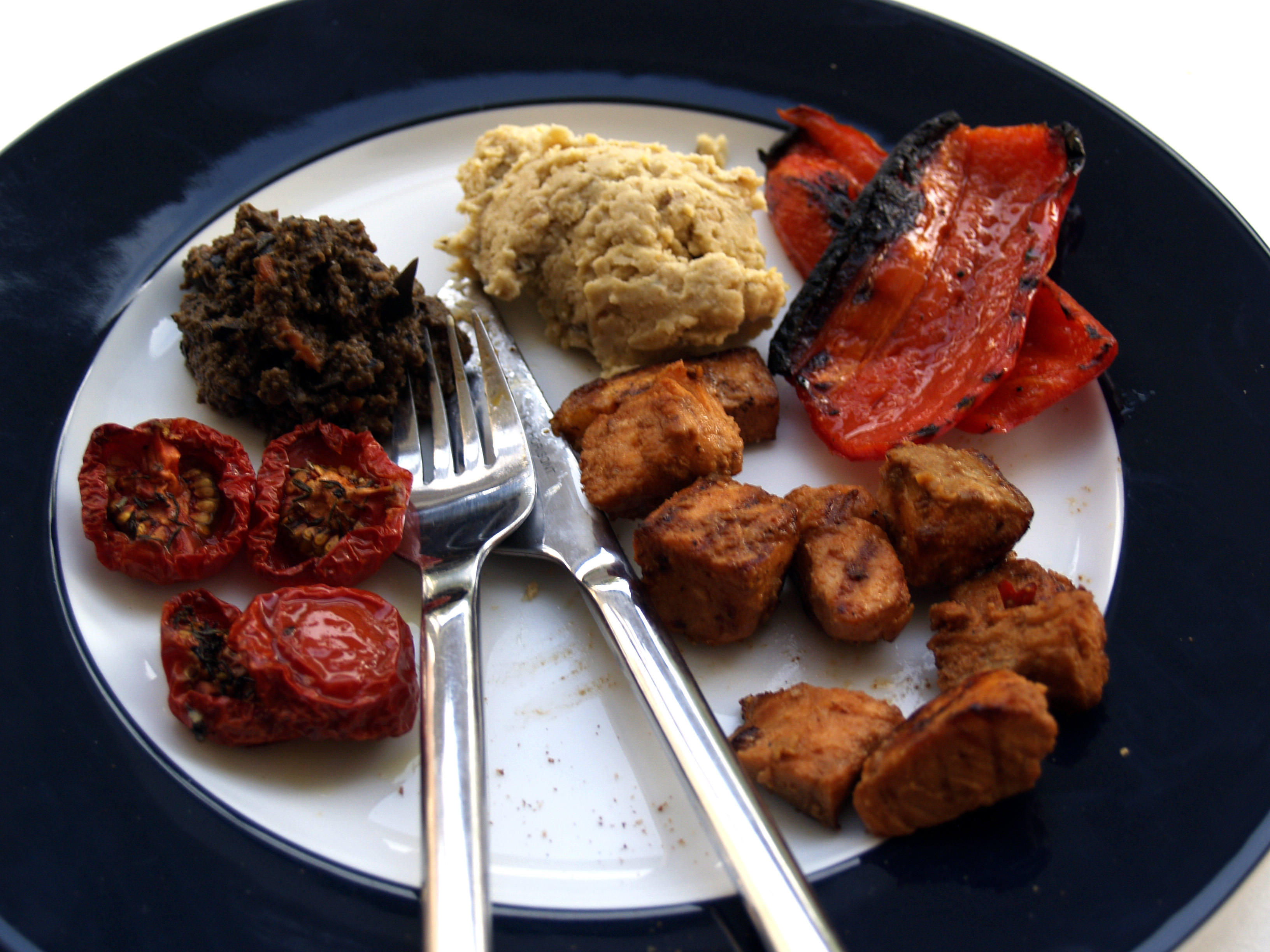 Semi-dried tomater, oliventapenade, hummus, grillet peberfrugt og laks